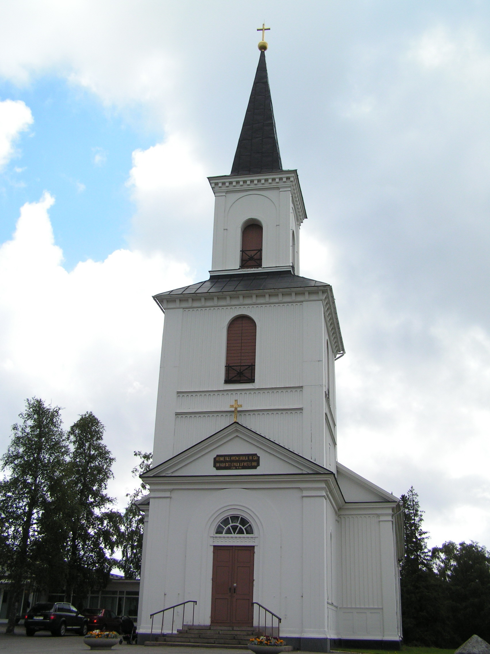 Holmsund Church, Holmsund, Sweden (exterior)